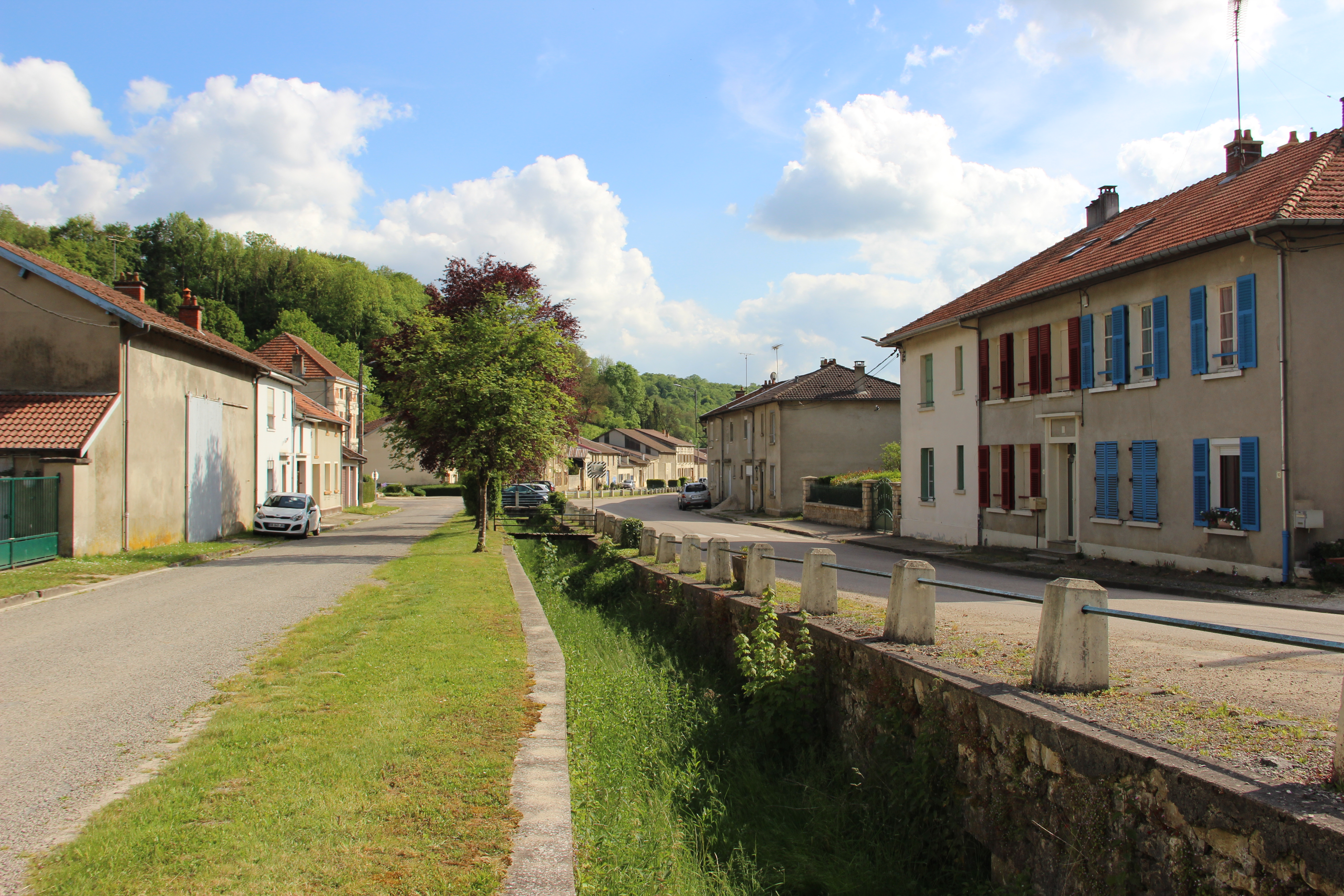 La rue du Chanoine Souplet et le ruisseau de Montplonne